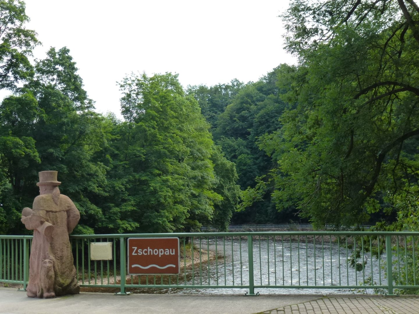 Zschopaubrücke bei Ringethal mit der Skulptur des Rittergutsbesitzers, der 1863 eine Steinborgenbrücke erbauen ließ